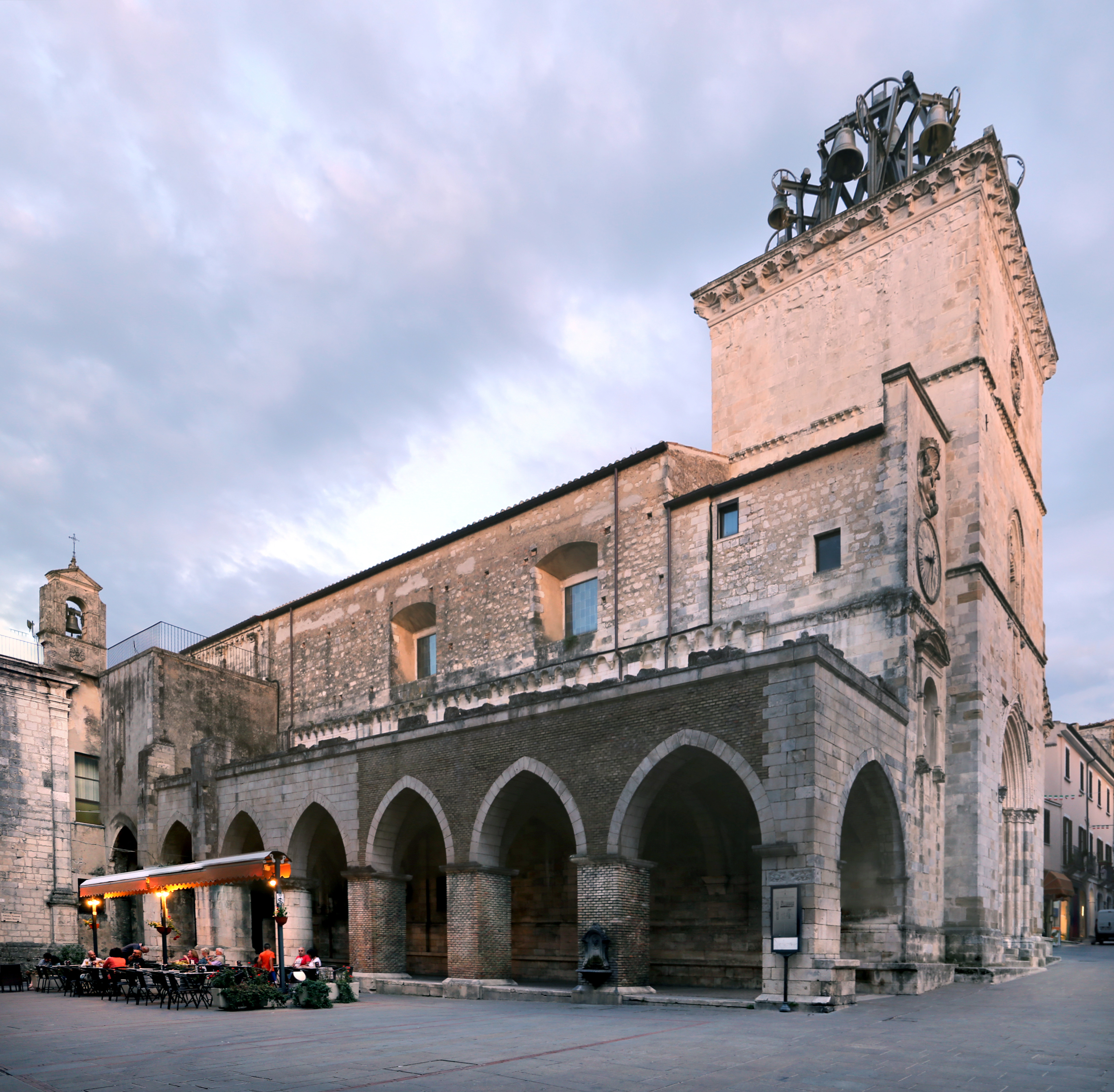 Piazza Santa Maria Maggiore This is a photo of a monument which is part of cultural heritage of Italy.